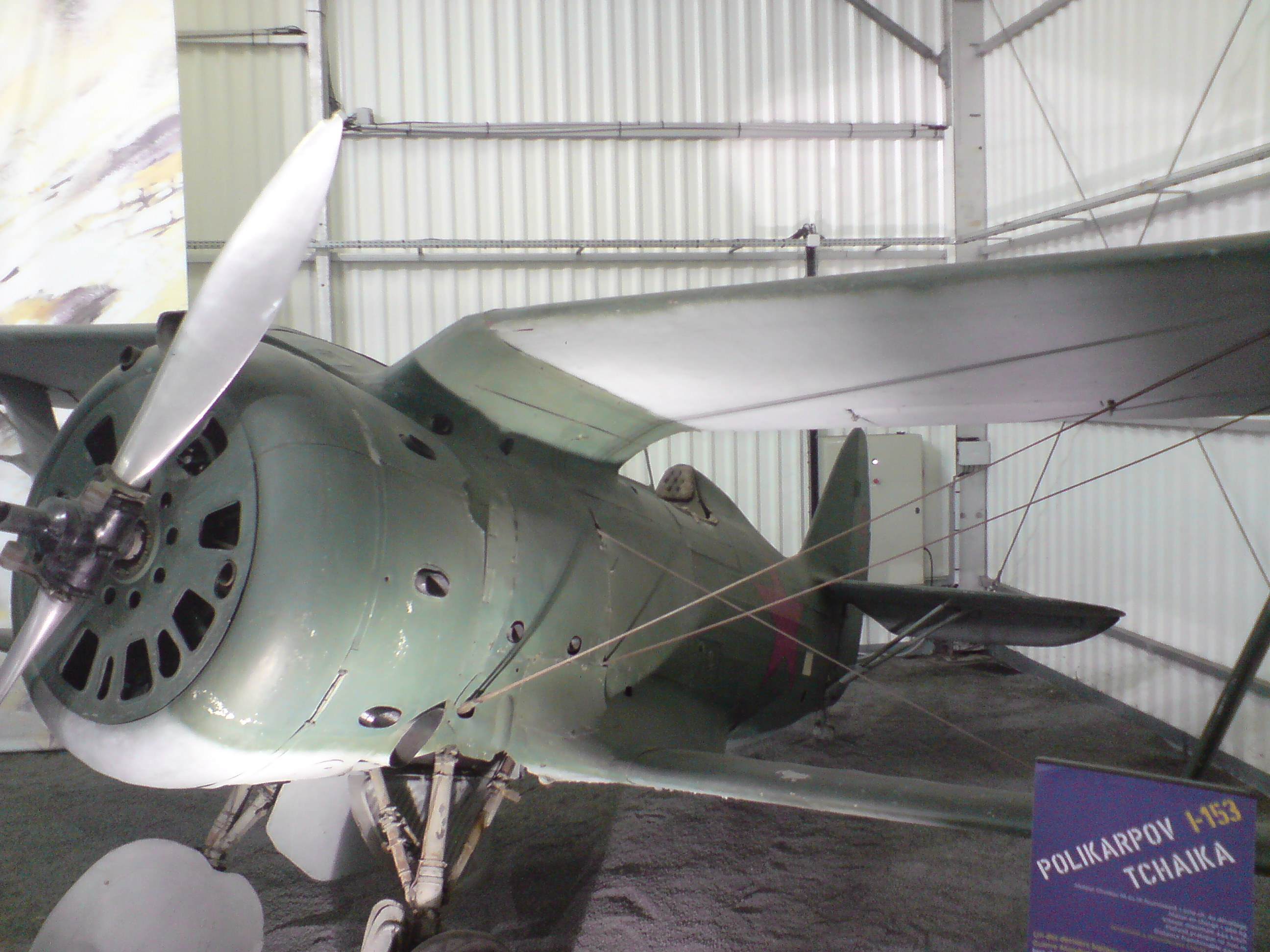 Chasseur soviétique biplan, le Polikarpov I-153, malgré sa vétusté, a fait de gros dégâts à la Luftwaffe.